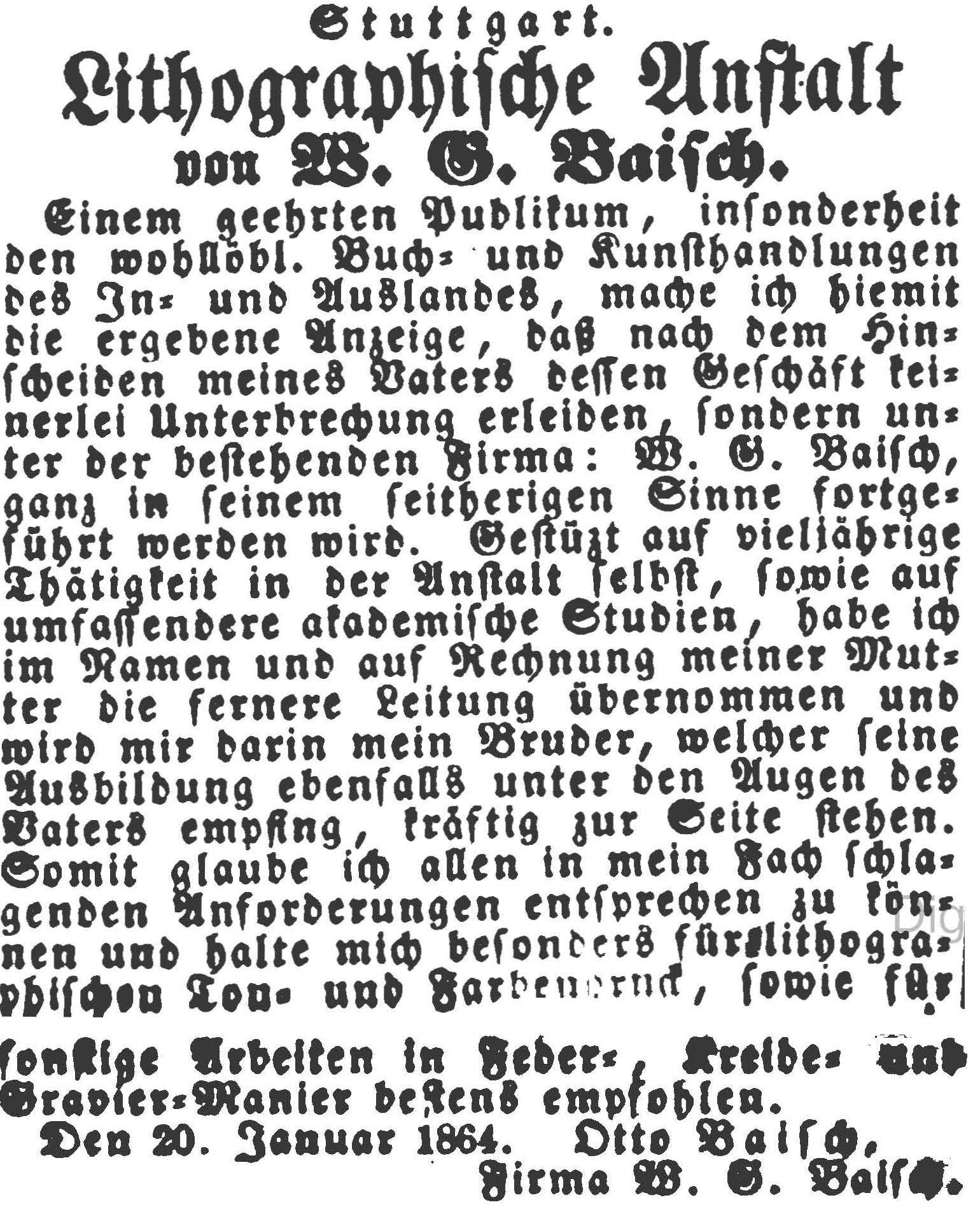 Übernahme der Lithographischen Anstalt von W. G. Baisch durch Otto Baisch, den Sohn des verstorbenen Wilhelm Gottlieb Baisch nach dessen Tod, Geschäftsanzeige, 1864.